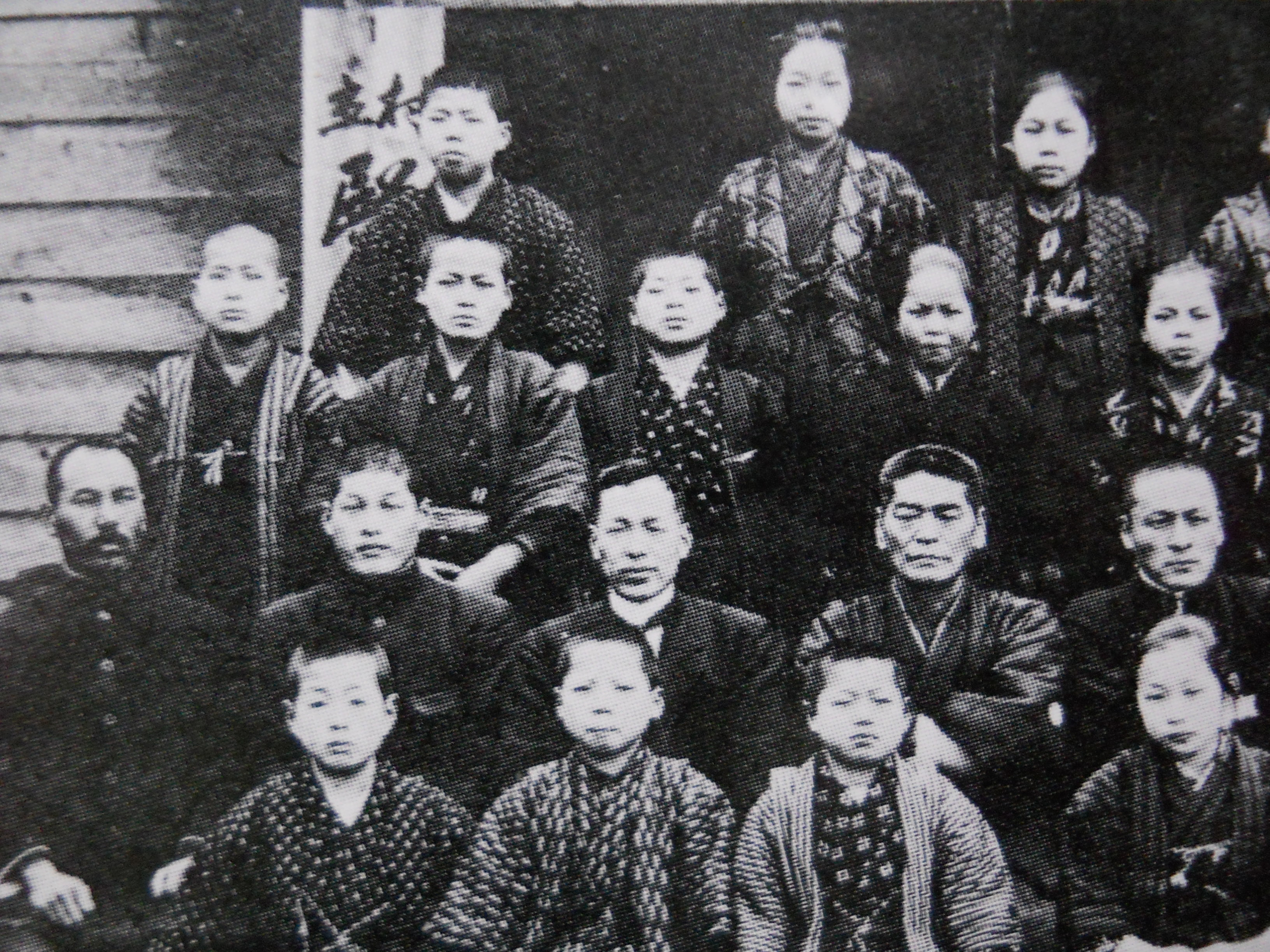 Zirou Ishiba01